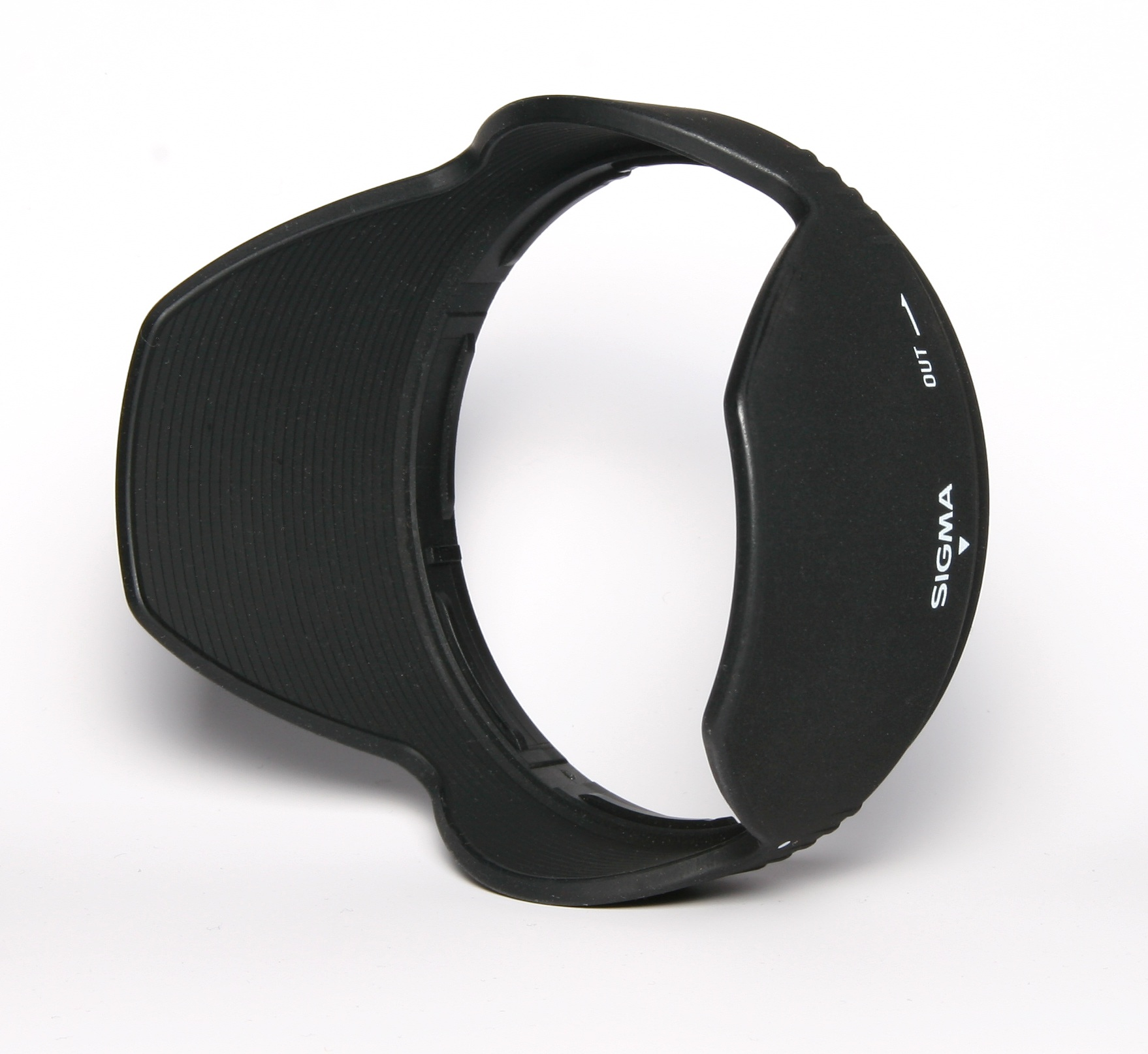 Gegenlichtblende zum Objektiv Sigma 18-50/2.8 EX DC. Fotografiert von Andreas Frank User:afrank99